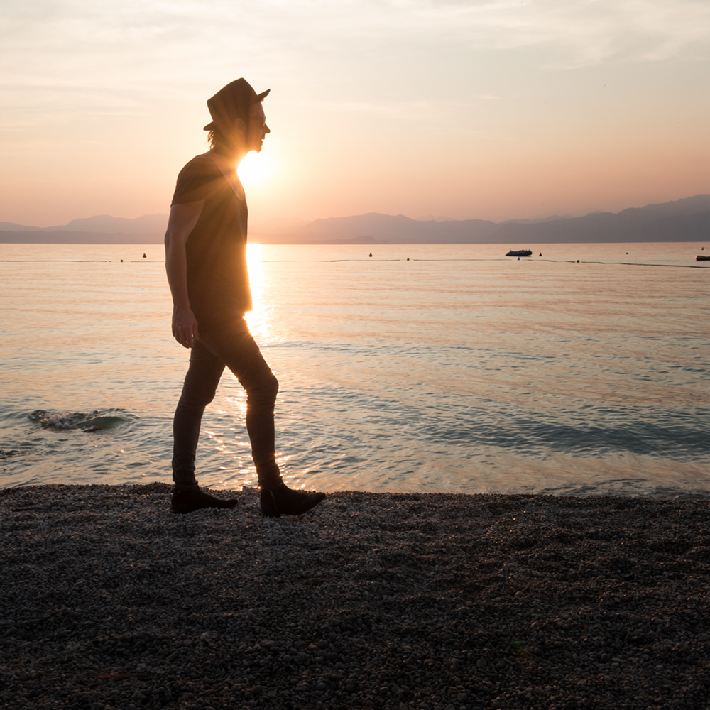 Norman Keil. Gardasee 2016.